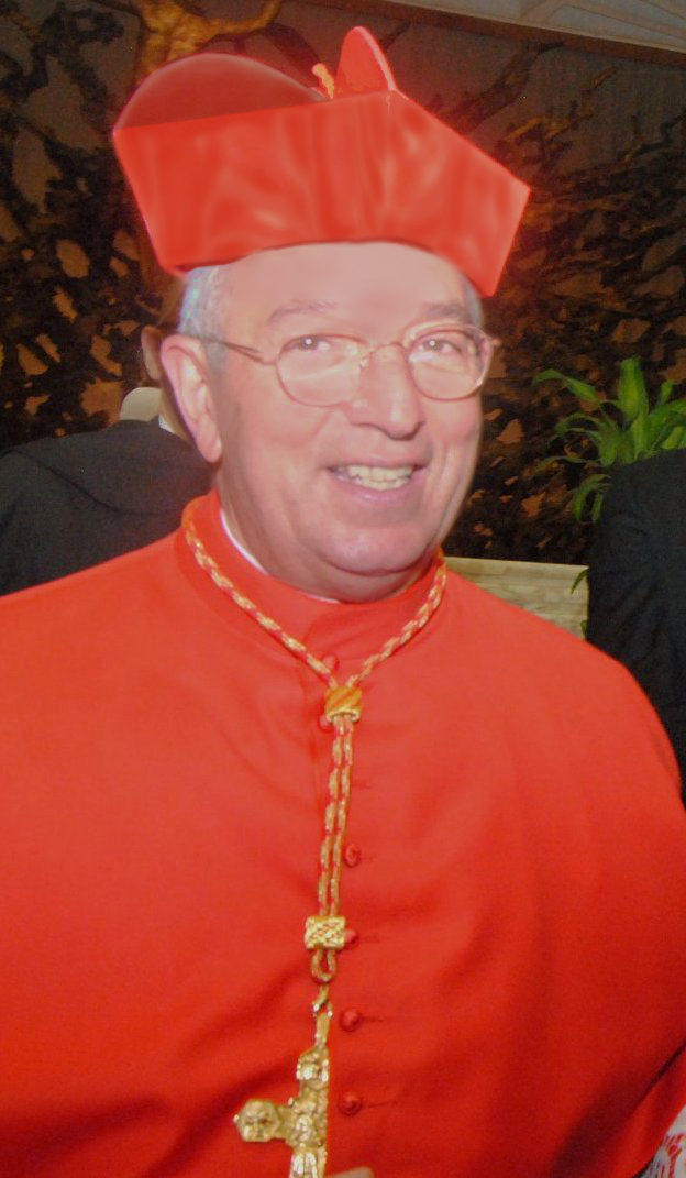 Foto del Cardinale Angelo de Donatis